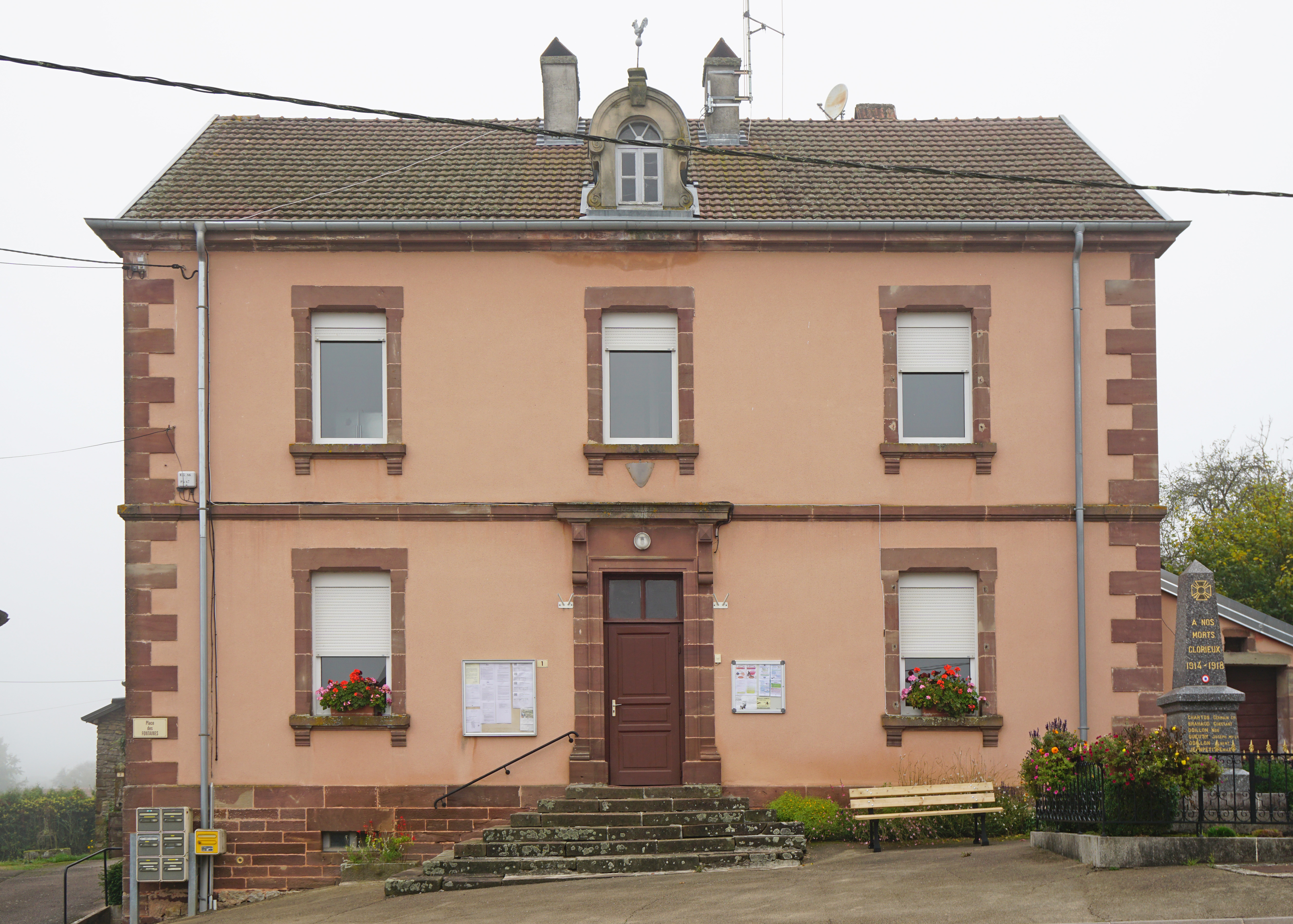 Mairie de Betoncourt-Saint-Pancras.